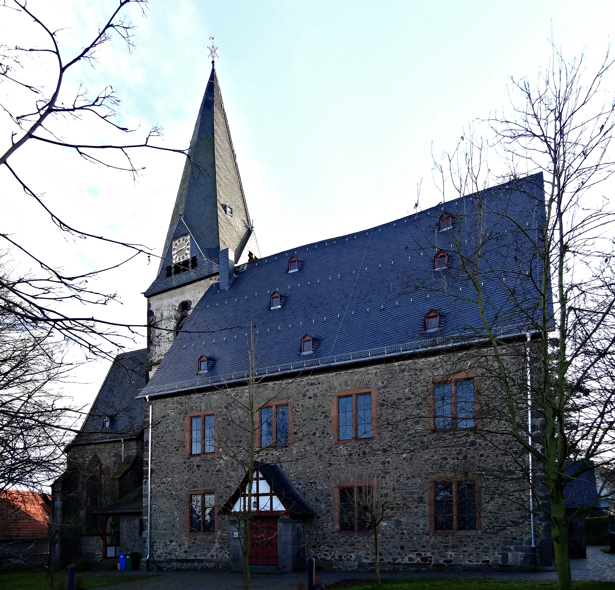 Evangelische Stadtkirche Hungen